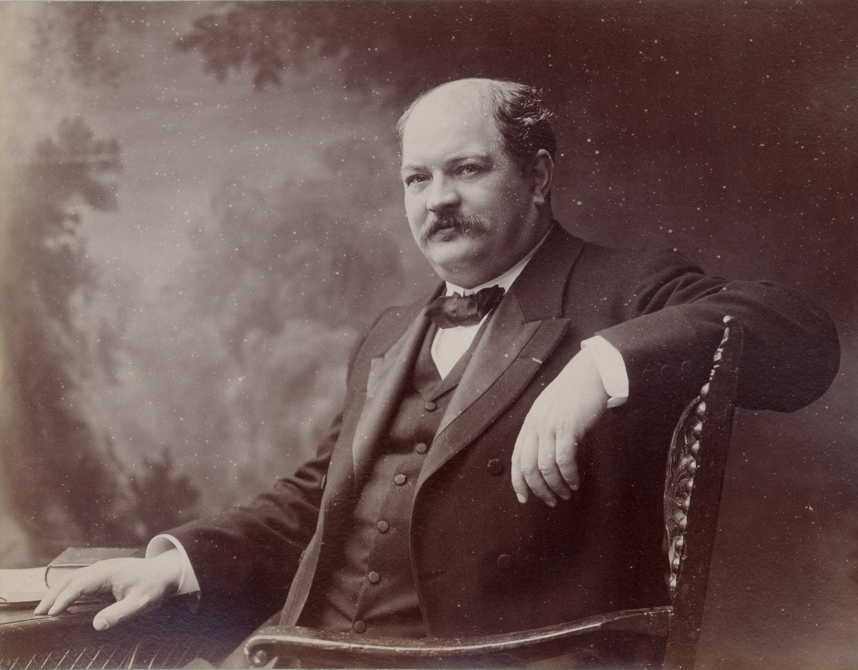 Léon Gaudillot par Ateliers Nadar